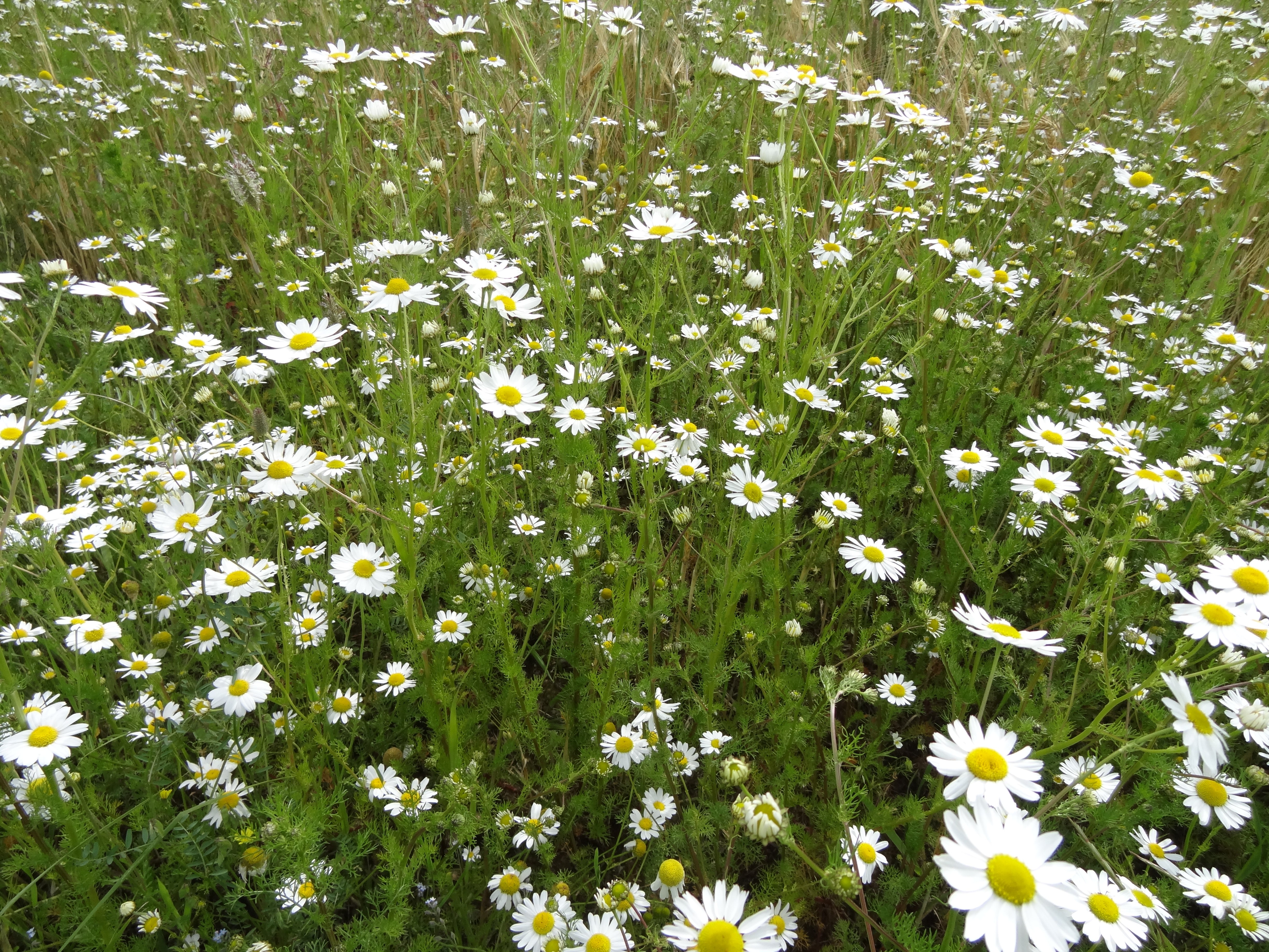 Acker-Hundskamille, Asteraceae, Deutschland, Bayern, Oberfranken, Selbitz Photo: U.Schmidt, 28.VI.2012